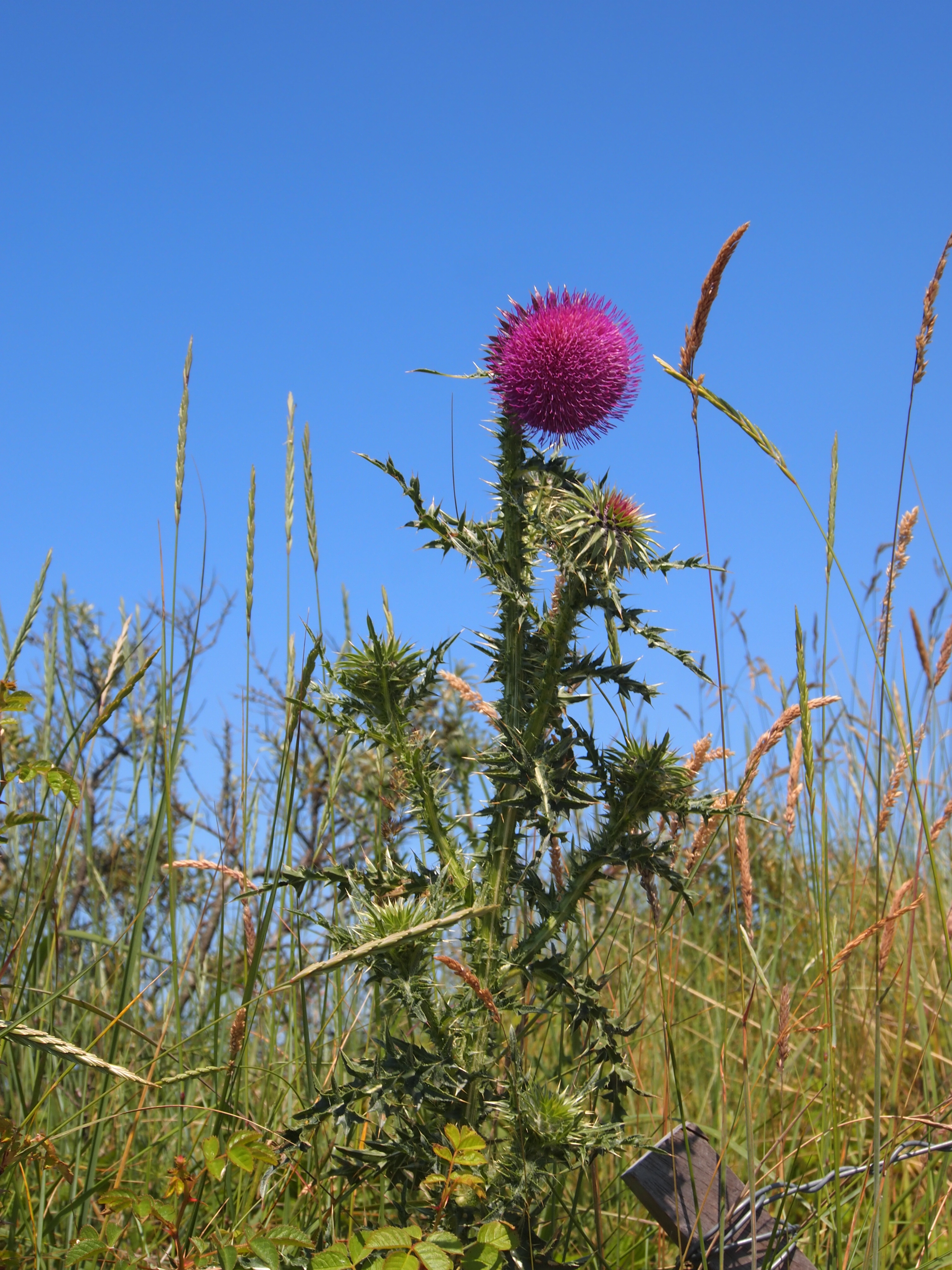 De knikkende distel in bloei. NP Schiermonnikoog This is a photo or sound file made in Schiermonnikoog National Park in the Netherlands, with the main subject of the file in the category: flora